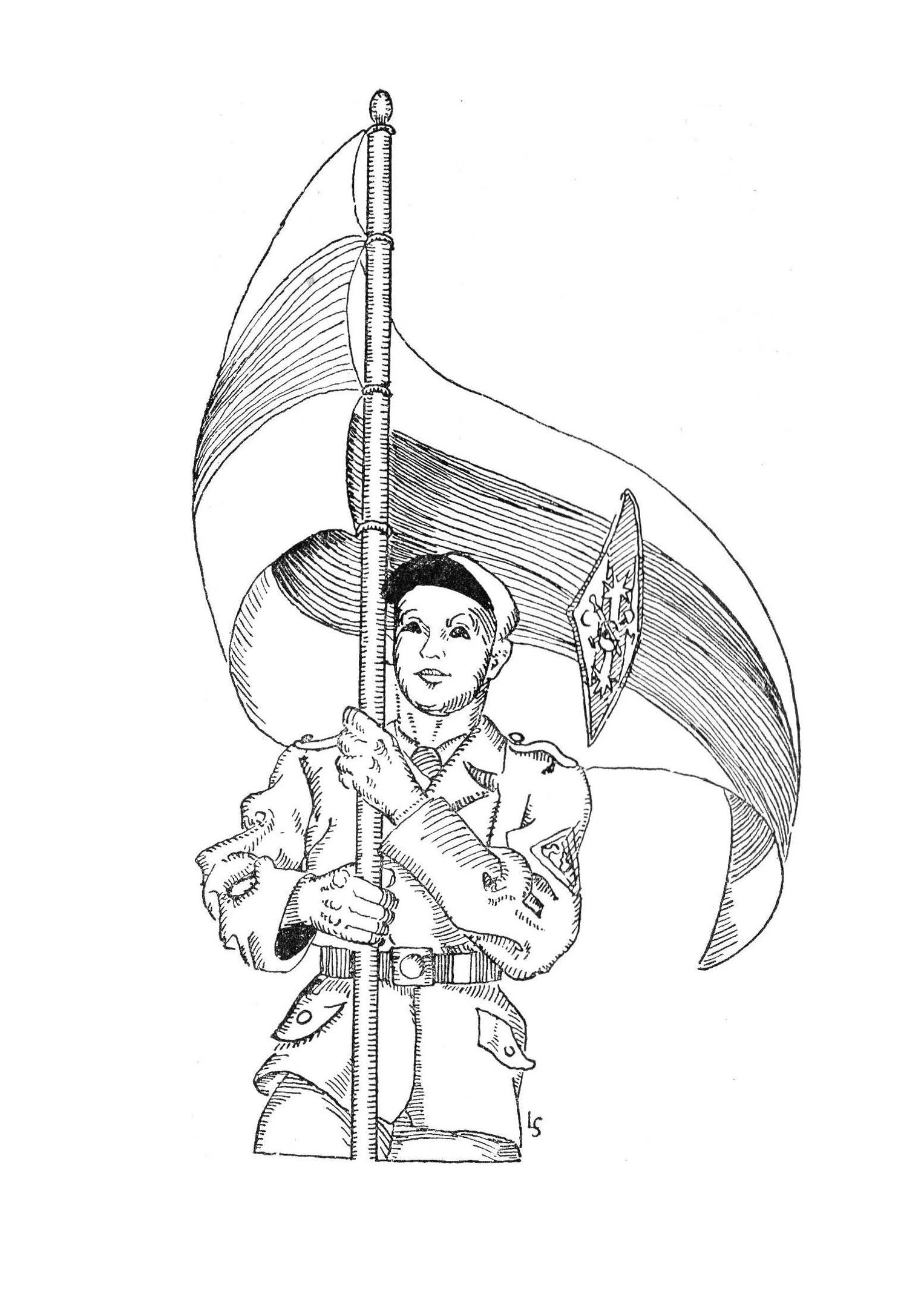 Малюнак з «Юнацкага сьпеўніка» СБМ